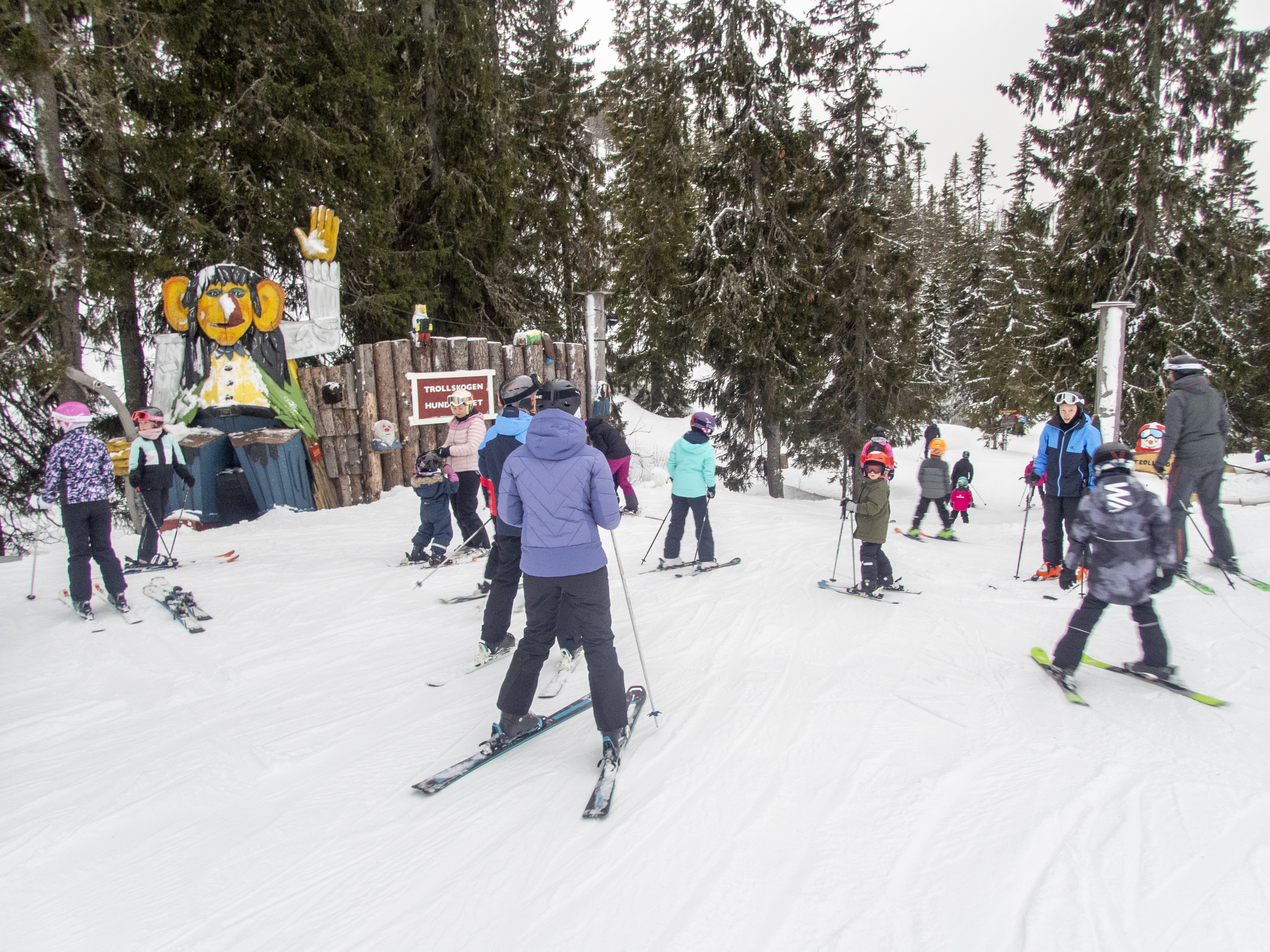 Hundfjället